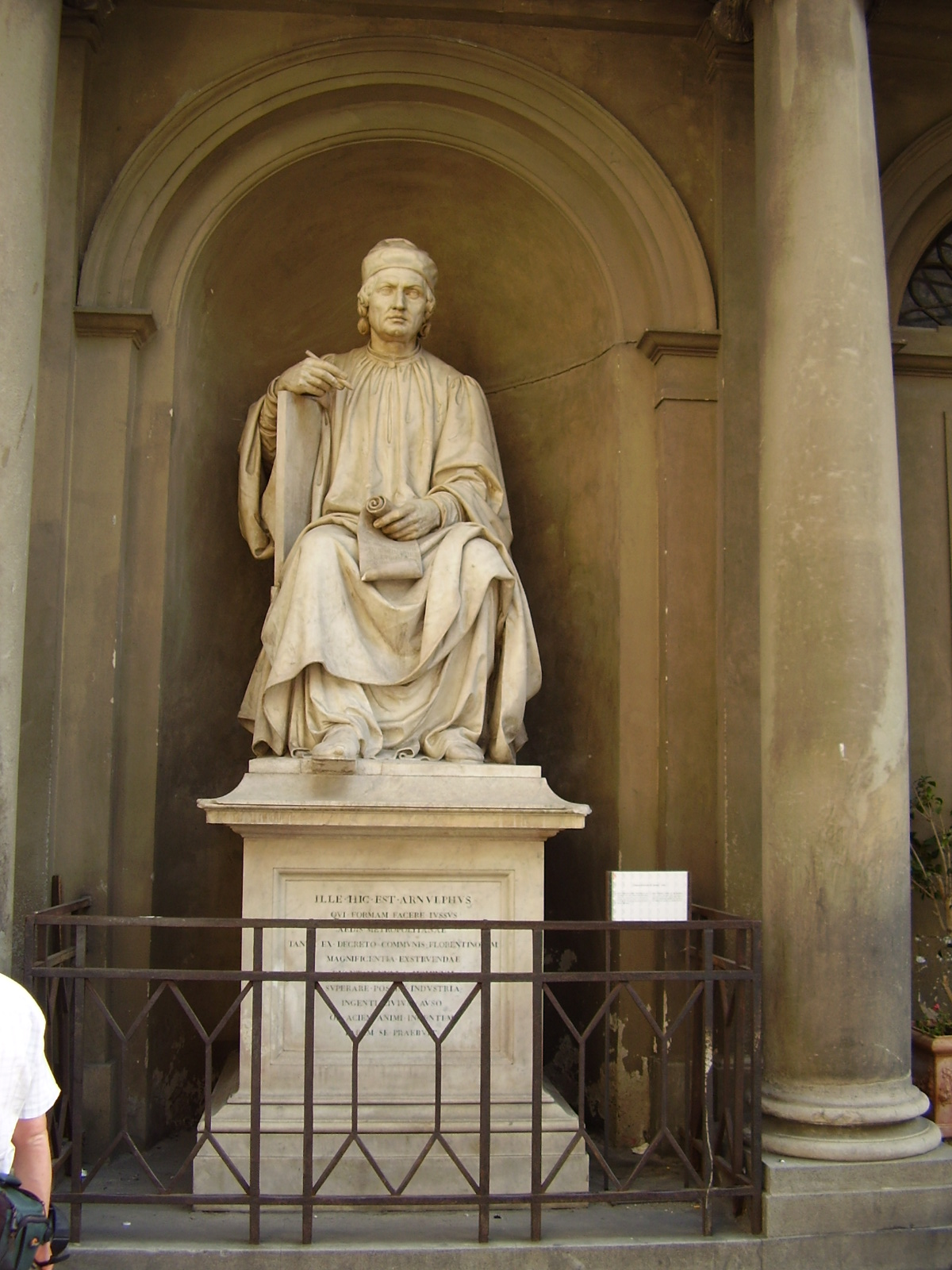 Arnolfo di Cambio portrait, sculpture in Piazza del Duomo by Luigi Pampaloni, Firenze, Florence, Italy